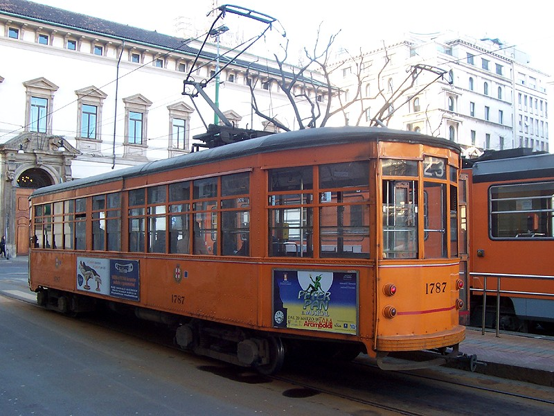 Milano - Tram in Piazza Fontana